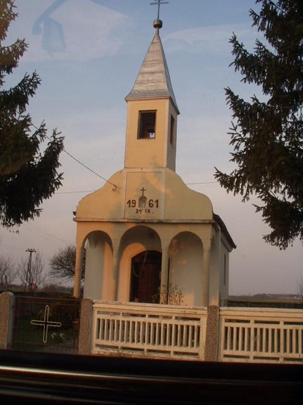 Poljanski Lug - Kapelica